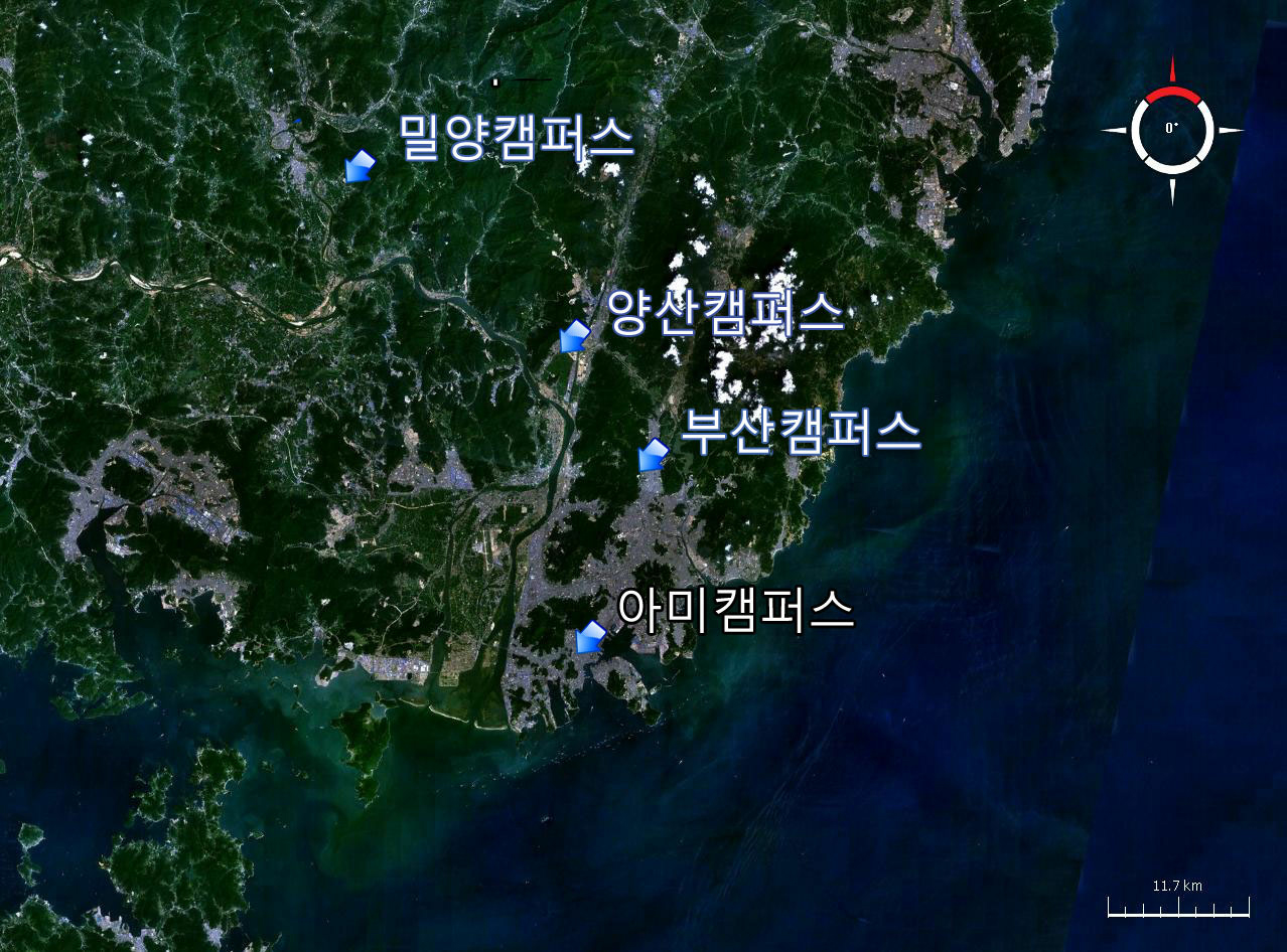 부산대학교의 캠퍼스 위치를 Landsat7 위성 사진을 이용해 나타내었다. 화살표의 그림은 File:Sdm.svg에서 구하였다.